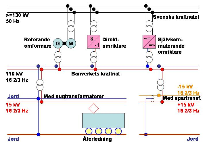 Driftsschema